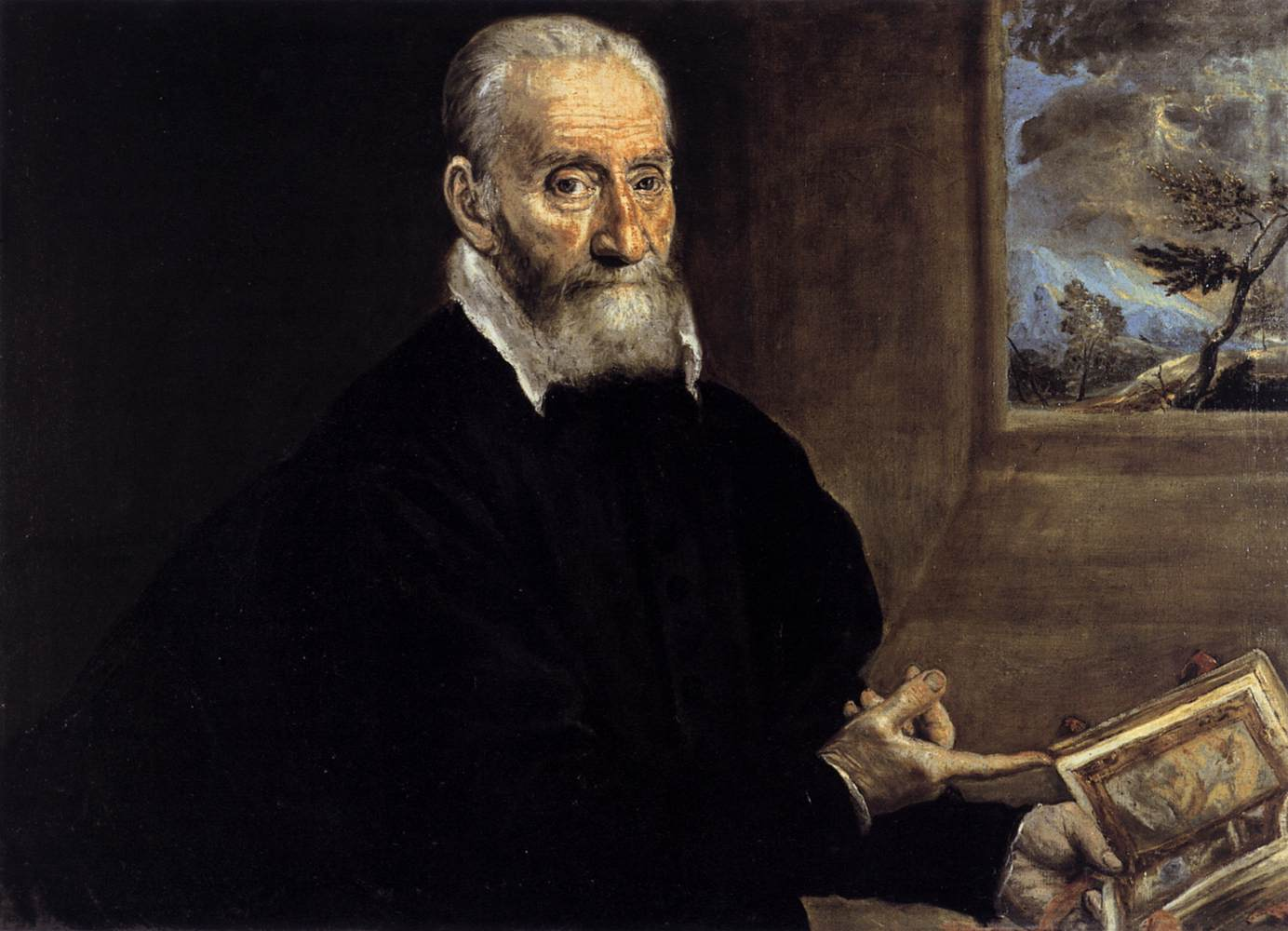 Il Ritratto di Giulio Clovio di El Greco è un quadro (olio su tela, cm 62 x 84) che si trova a Napoli nel Museo di Capodimonte (inv. Q 191), facente parte della Collezione Farnese. Il dipinto ritrae Giulio Clovio, uno dei più celebri miniatori del Cinquecento, che tiene fra le mani una delle sue opere, il Libro d' ore, realizzato per Alessandro Farnese ed oggi a New York alla Pierpont Morgan Library. In questo ritratto si può anche ravvisare un gesto di riconoscenza, in quanto che El Greco giunse a Palazzo Farnese nel 1570 grazie all' intermediazione di Giulio Clovio.